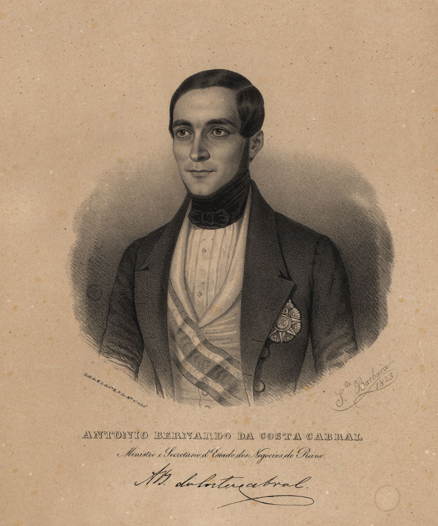 Político português, deputado, Conselheiro, Par do Reino, ministro dos Negócios Eclesiásticos e da Justiça, ministro do Reino e presidente do Conselho de Ministros do 18.º Governo da Monarquia Constitucional Portuguesa. Conde e Marquês de Tomar